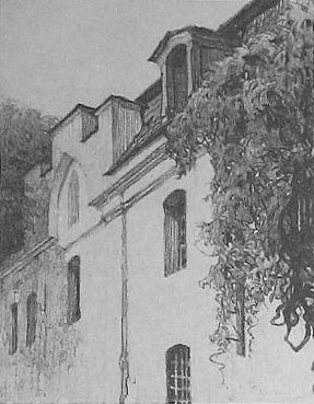 Беларуская (тарашкевіца): Дзявяткавічы (Dziaviatkavičy), сядзіба Сьлізняў (Ślizień)